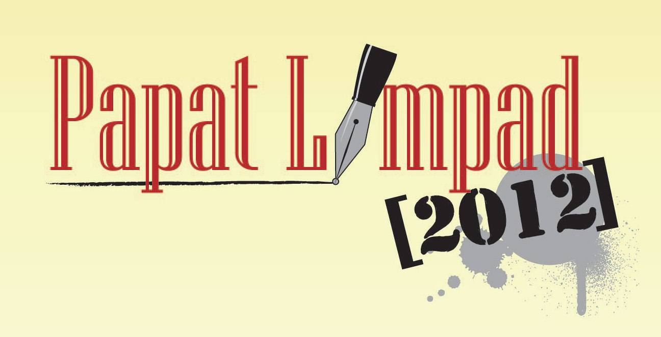 Basa Jawa: Logo Papat Limpad 2012